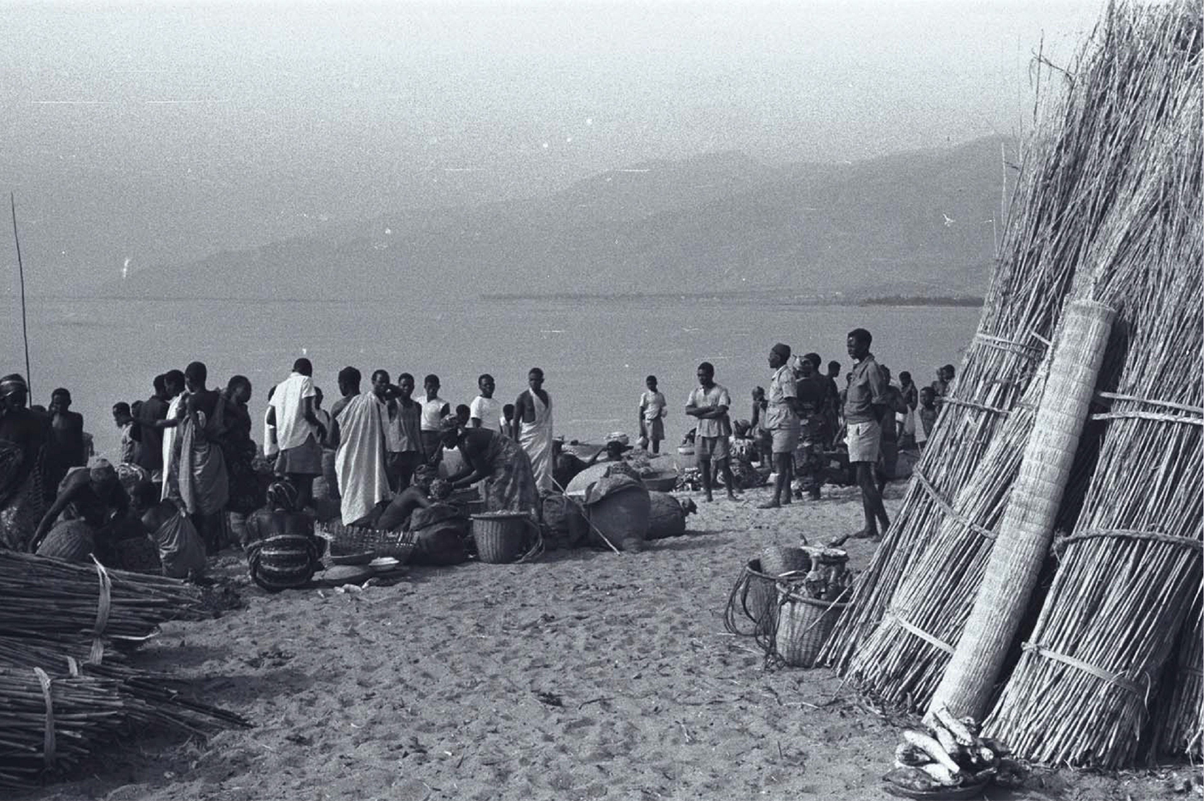 Image offerte a la communauté mondiale par Gorges Weis, tirée de sa brochure "Itombwe... mon amour Le pays d'Uvira de 1954 au 21e siècle", 1999 inédit